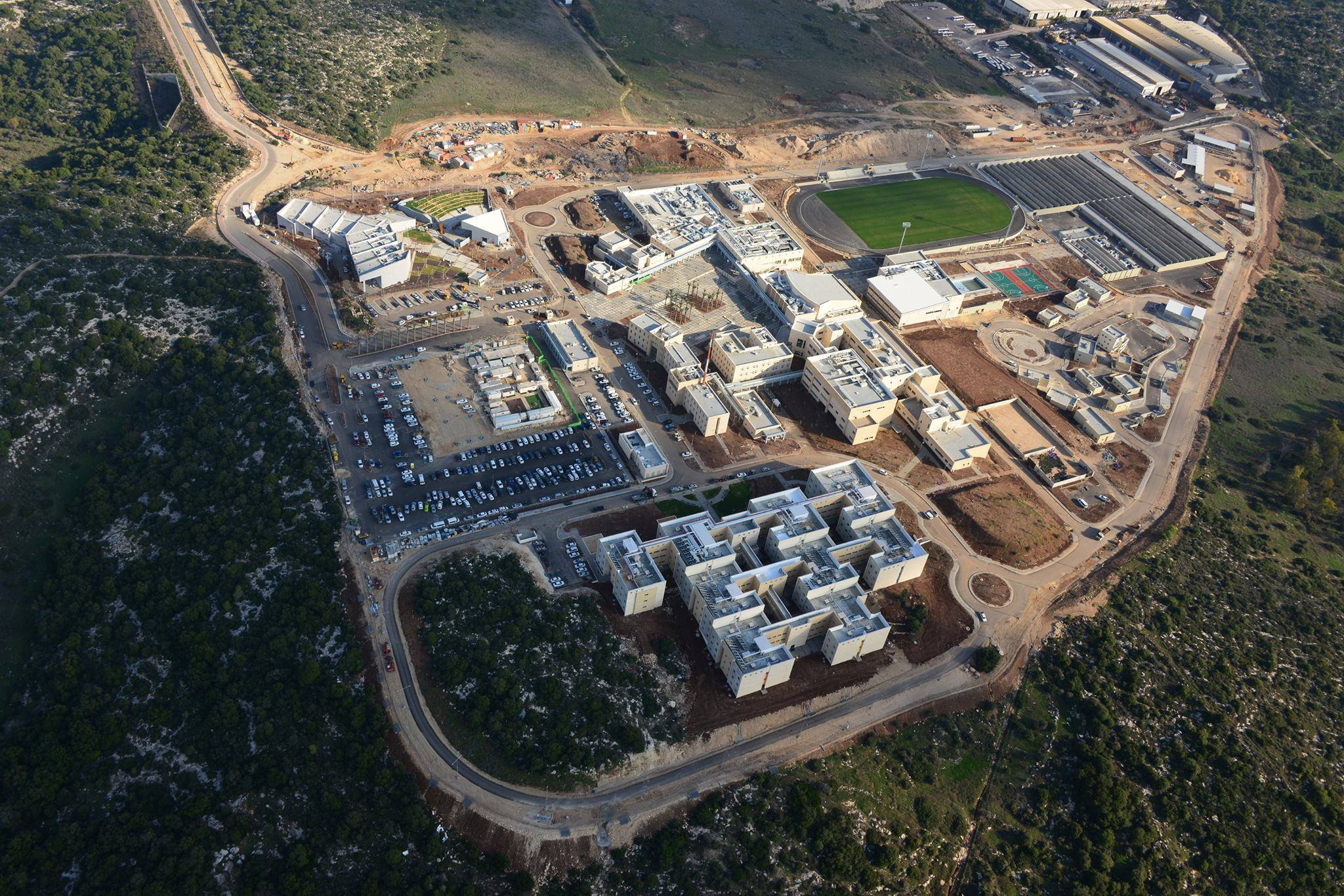 המכללה הלאומית לשוטרים